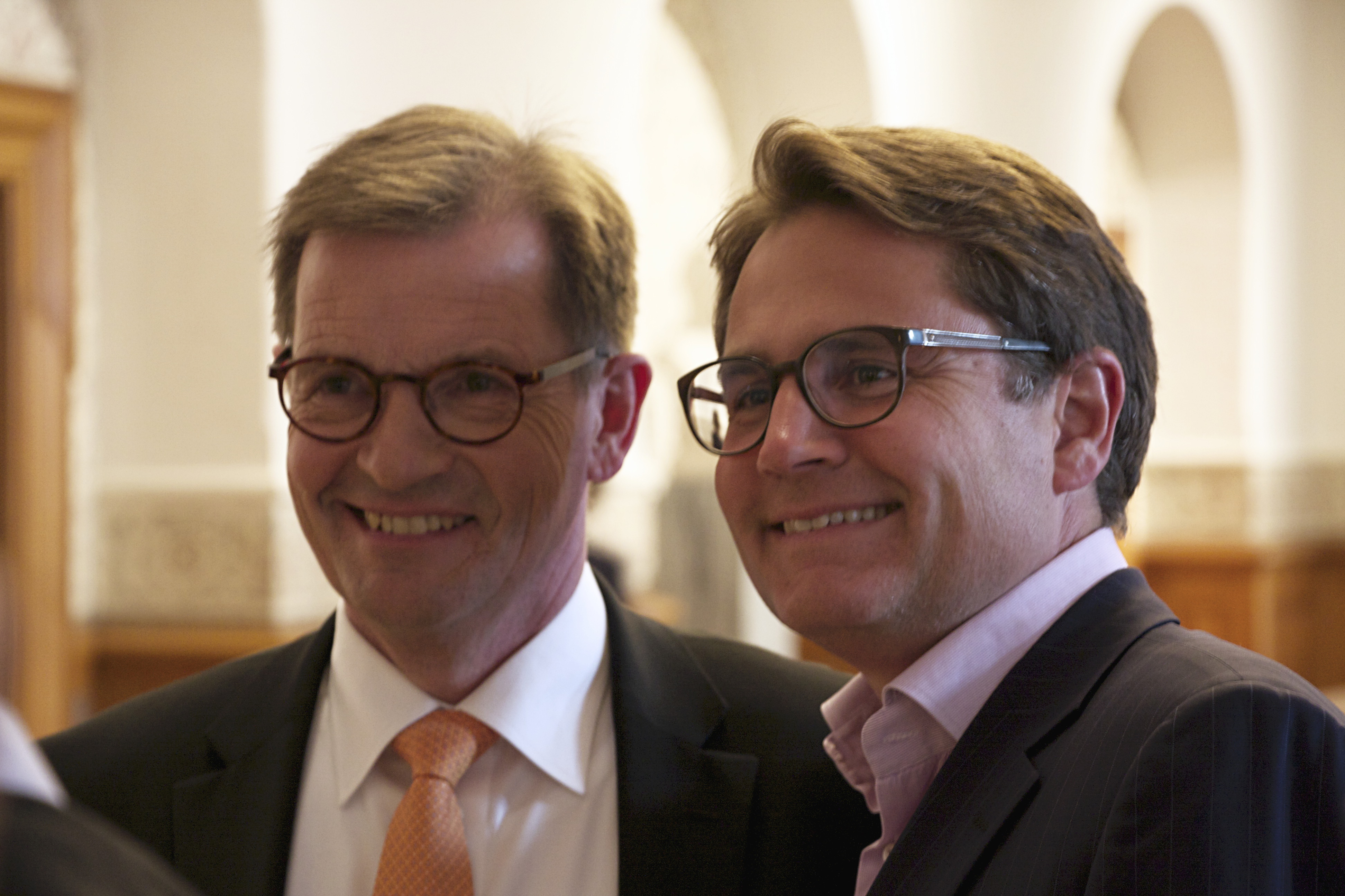 MEP Bendt Bendtsen og MF Brian Mikkelsen, begge fra Det Konservative Folkeparti.